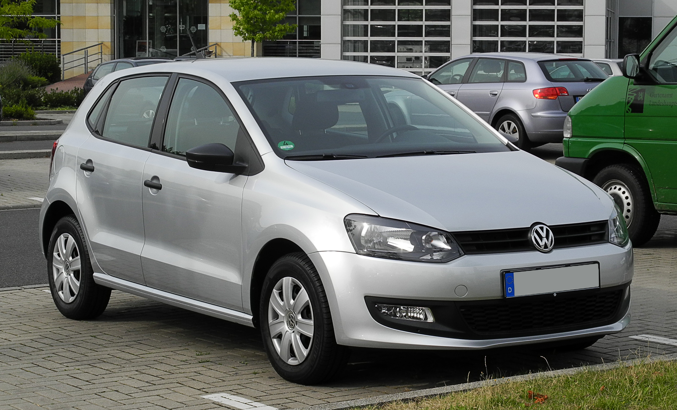 VW Polo Trendline (V)